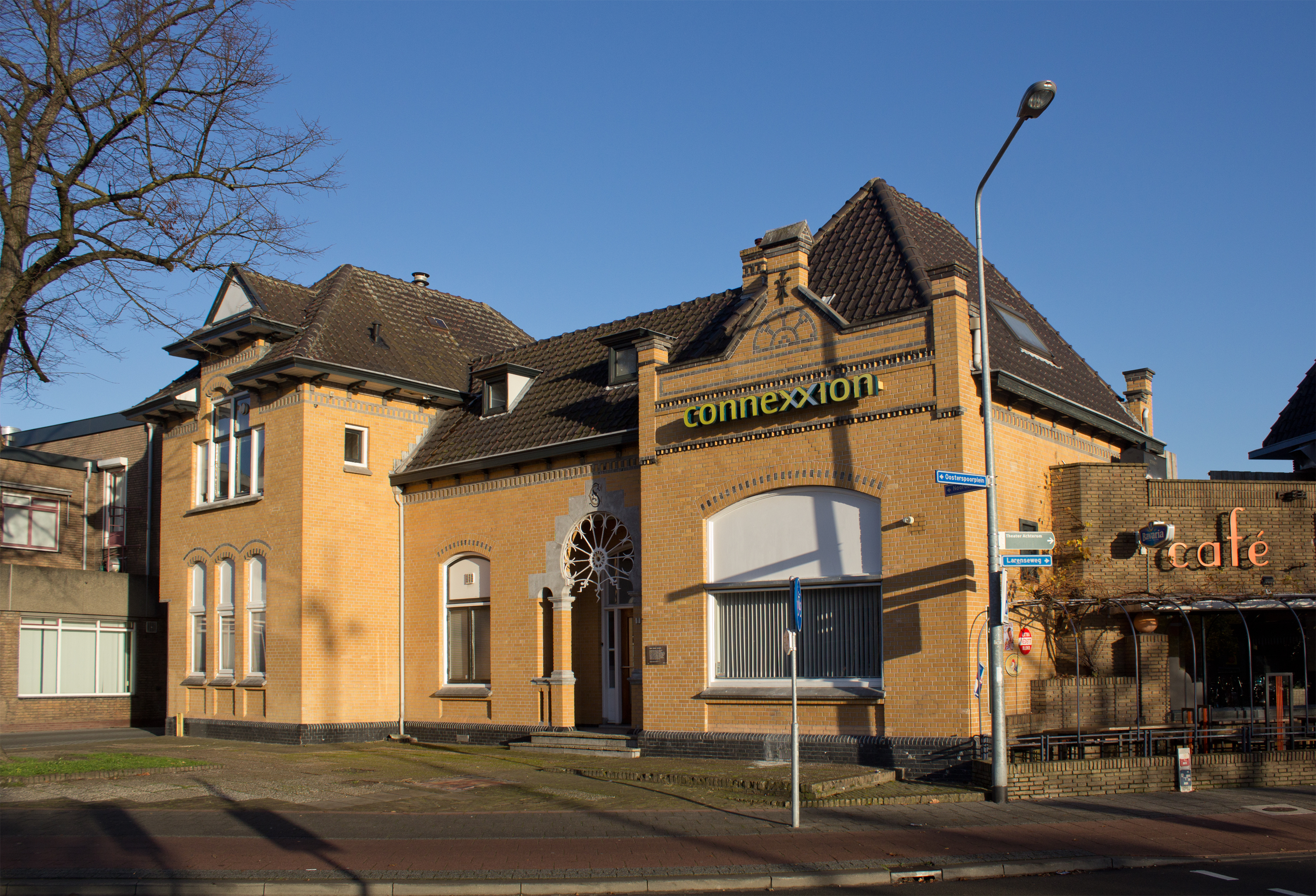 Hilversum, voormalig stationsgebouw van de Gooische Stoomtram, tegenwoordig busstation van Connexxion